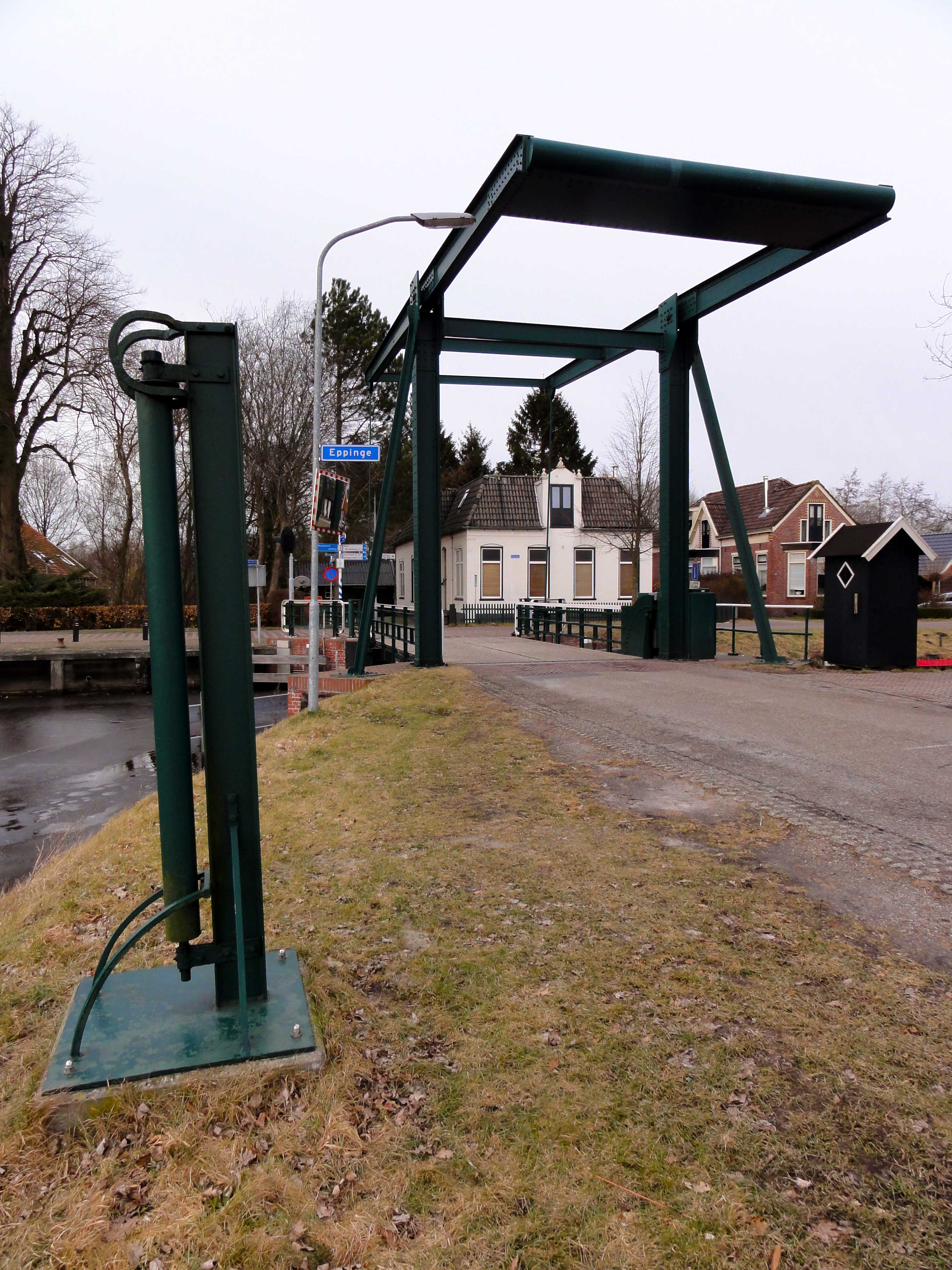 Ophaalbrug met rolpaal over het Grevelingskanaal, provinciaal monument